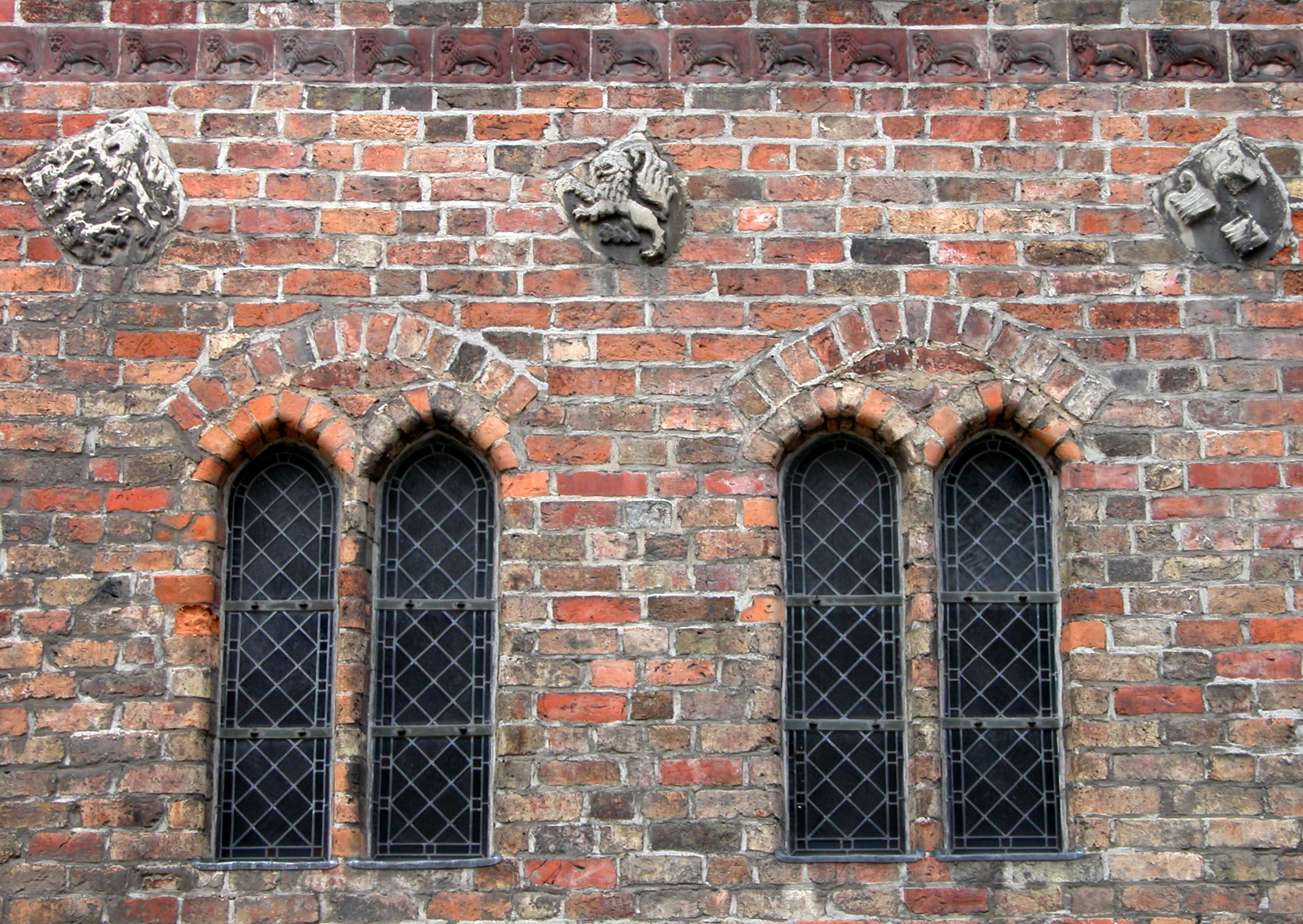 Braunschweig, Liberei: Details der Südseite (Fenster, Wappen und Löwenfries).